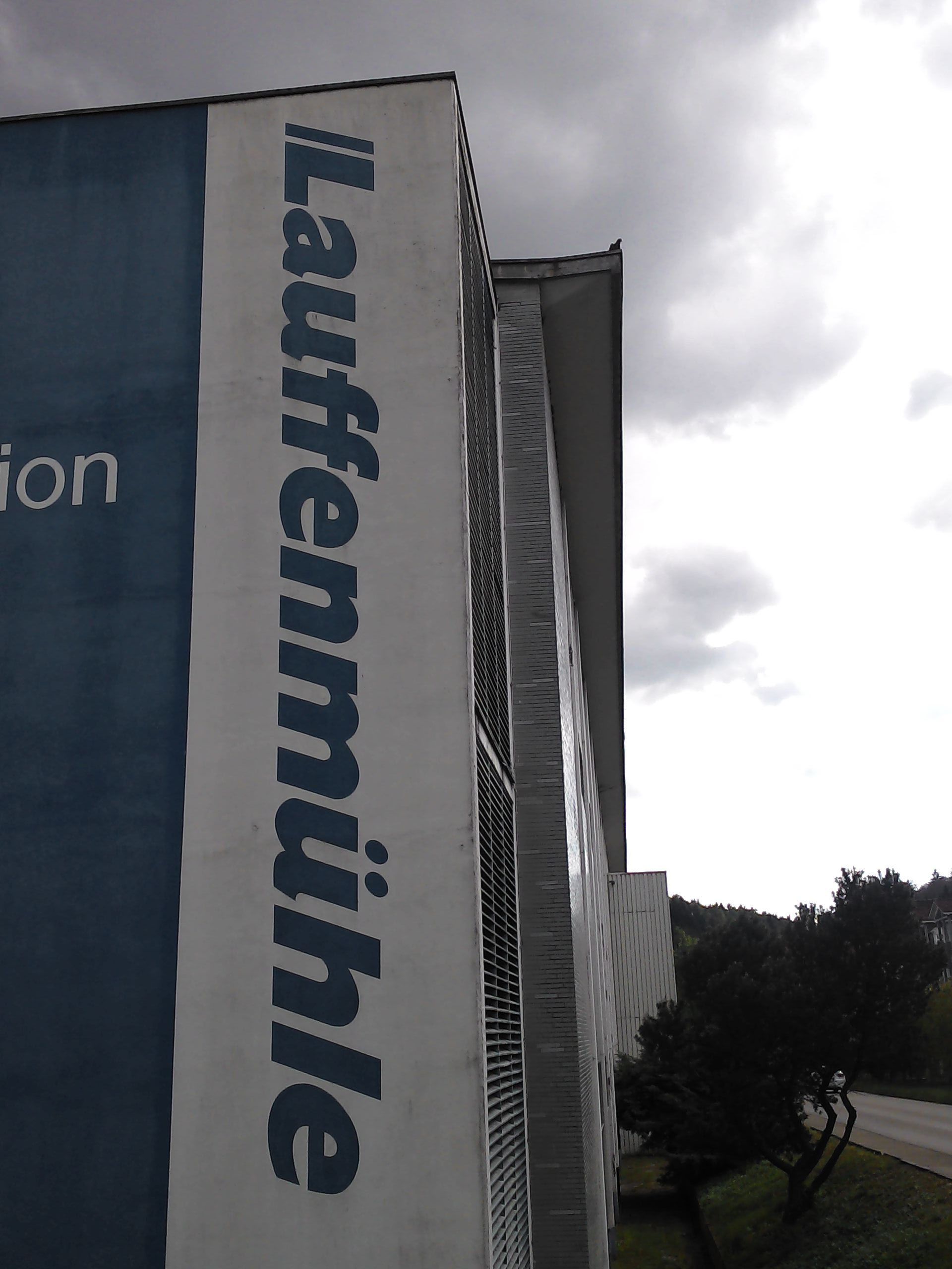 Textilunternehmen Lauffenmühle in Lauchringen, Landkreis Waldshut, Baden-Württemberg. Logo am Hochregallager.